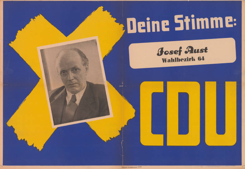 Deine Stimme Josef Aust Wahlbezirk 64 CDU Abbildung: Porträtfoto Plakatart: Kandidaten-/Personenplakat mit Porträt Drucker_Druckart_Druckort: Kölnische Verlagsdruckerei GmbH Objekt-Signatur: 10-009 : 249.35 Bestand: Landtagswahlplakate Nordrhein-Westfalen (10-009) GliederungBestand10-18: Landtagswahlplakate Nordrhein-Westfalen (10-009) » Landtagswahl am 18.6.1950 » CDU » mit Porträtfoto Lizenz: KAS/ACDP 10-009 : 249.35 CC-BY-SA 3.0 DE